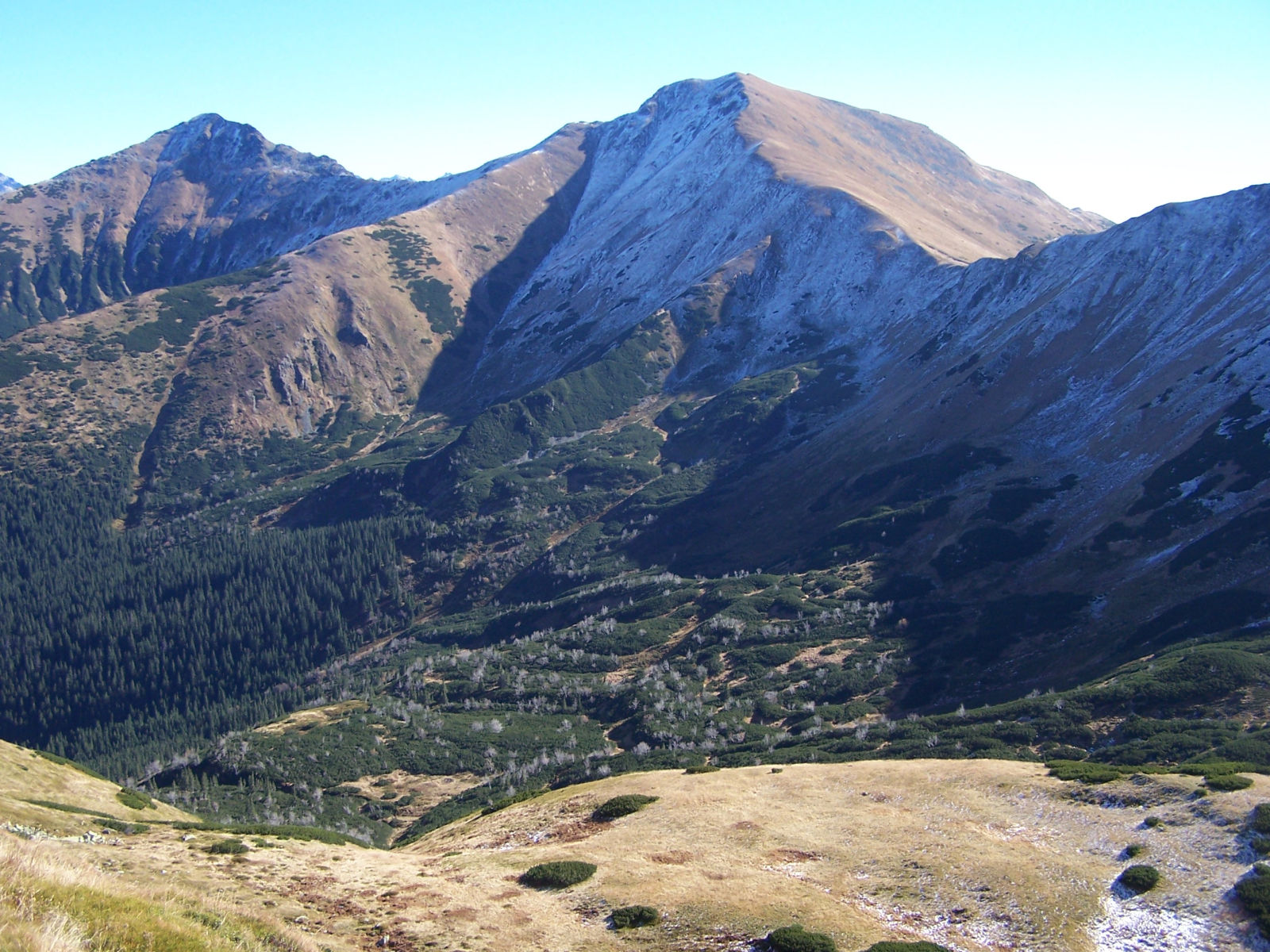 Smreczyński Wierch, Kamienista, Dolina Pyszniańska (West Tatra Mountains)